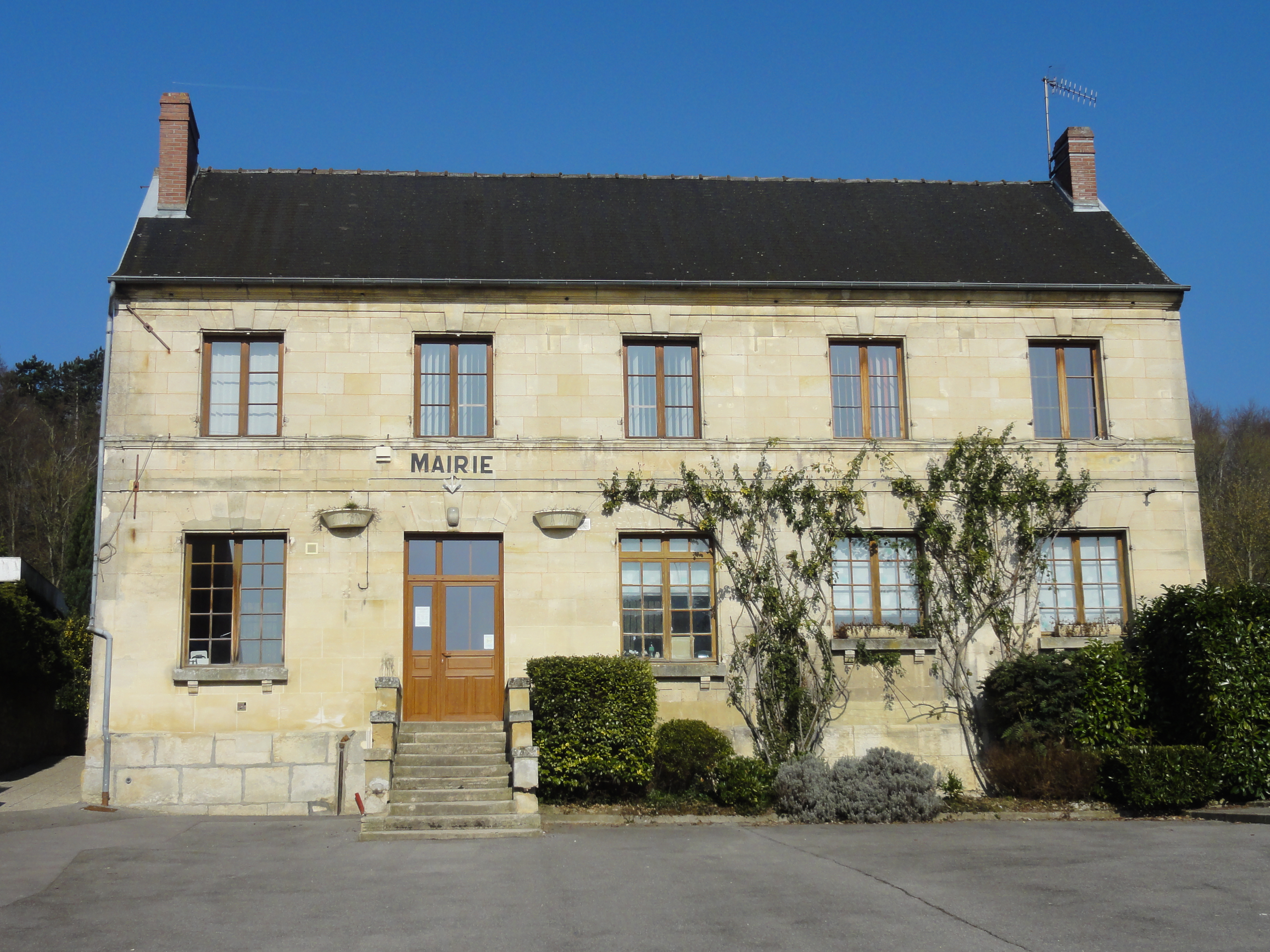 La mairie-école, rue Montlaville.